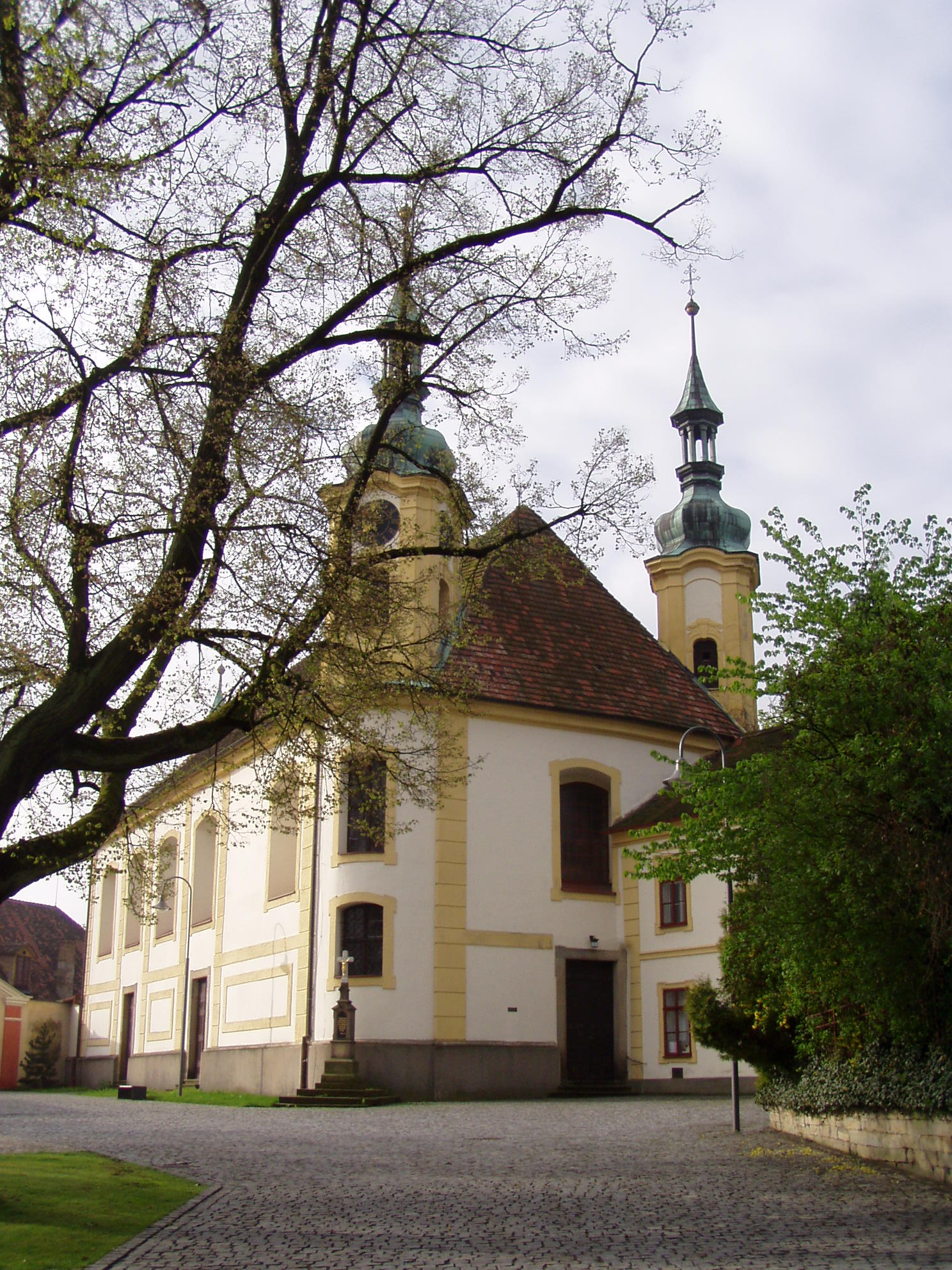 Kostel Nejsvětější Trojice v Opočně